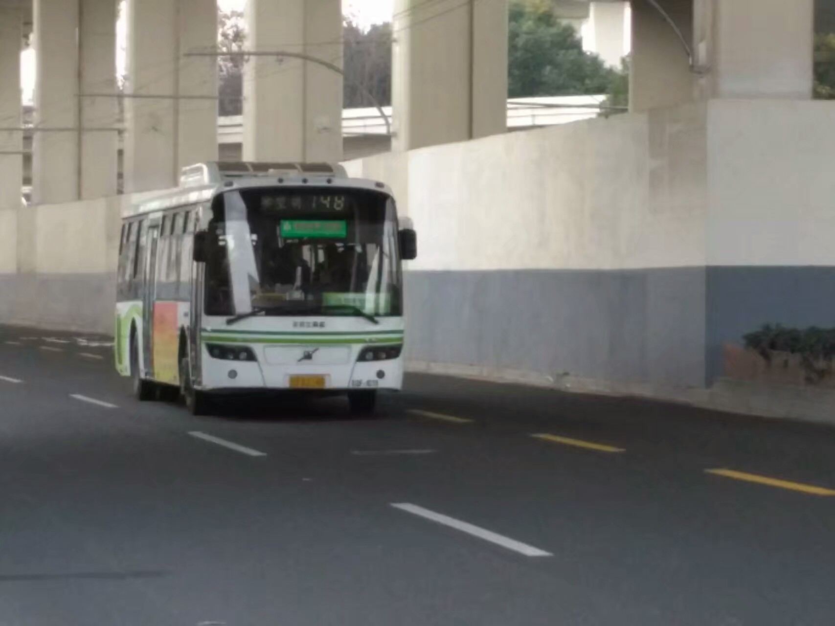 上海公交748路